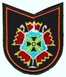 эмблема